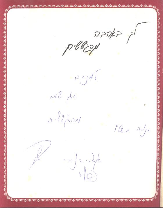 הקדשה. כתבו הגששים, סרק דוד שי